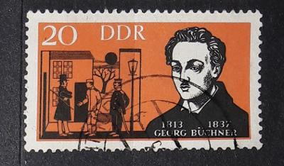 20 Pfennig Briefmarke der Deutschen Post der DDR. Motiv: "Georg Büchner", 1963